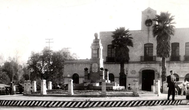 Fotografía tomada en los años cincuenta.